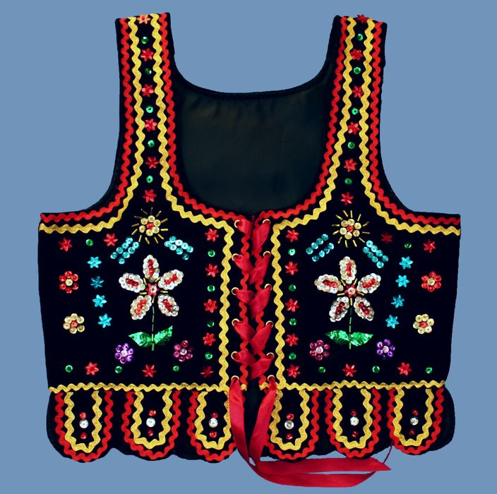 Sztuka ludowa.